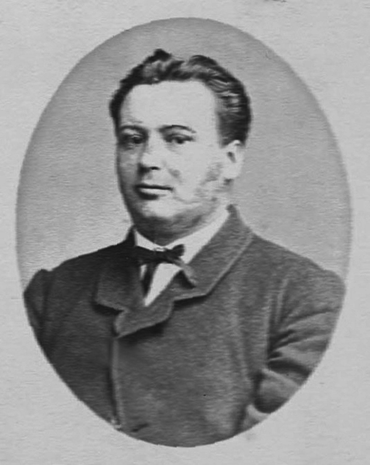 Porträtfotografie von Georg Riedesel Freiherr zu Eisenbach